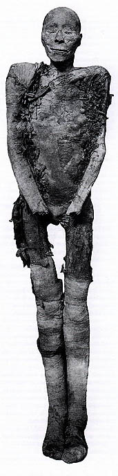 Momia JE 26217, tradicionalmente atribuida a Tutmés I, probablemente la del príncipe Ahmés Sa-Pa-Ir.